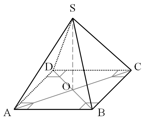 géométrie d'une pyramide